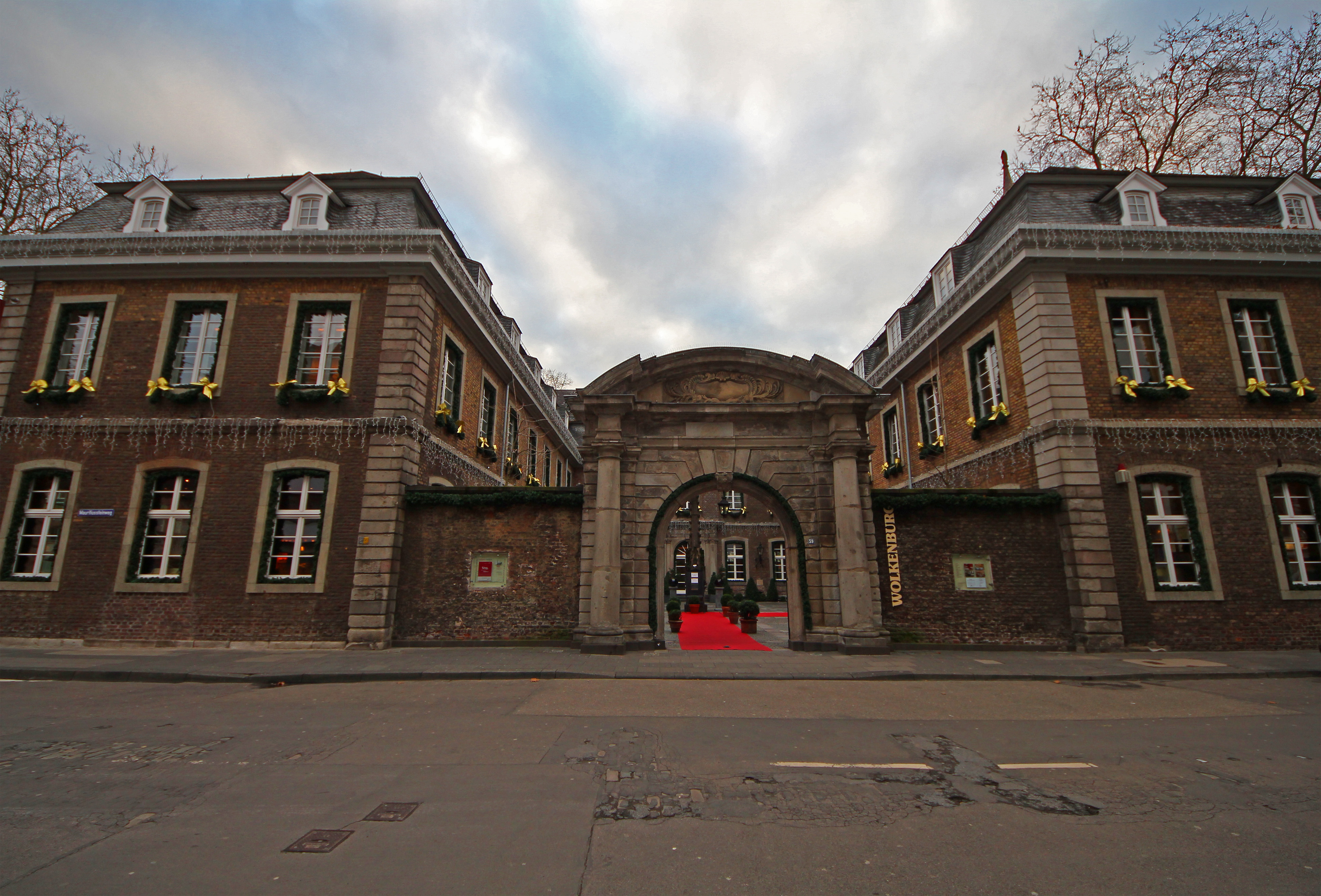 Die Kölner Wolkenburg mit Eingangsportal am Mauritiussteinweg.